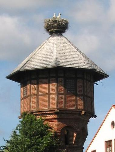 Storchendorf Rühstädt an der Elbe, Prignitz, Brandenburg.